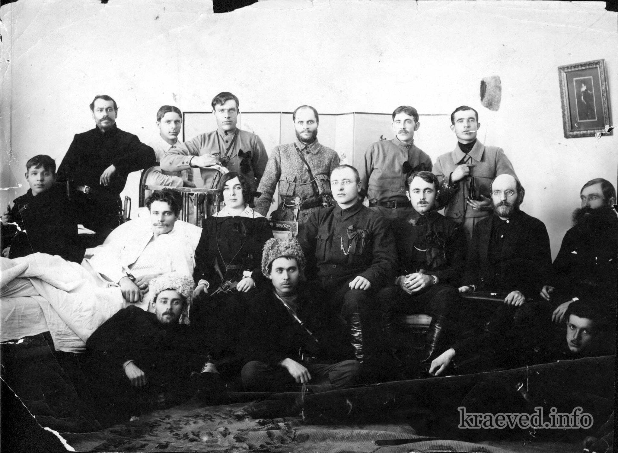 Руководство Сахалинской области и Николаевским округом (фронтом) в апреле 1920 г.